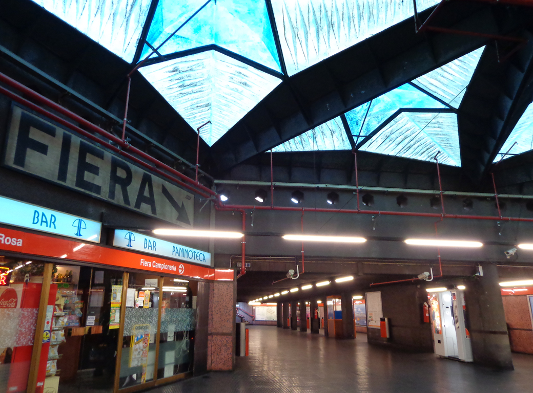 Stazione di Amendola della metropolitana di Milano, vecchie indicazioni per la Fiera nel mezzanino.